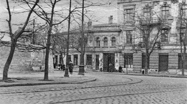 Вигляд на будинок Маюрова (Круглий дім). Кінець 1940-х років.